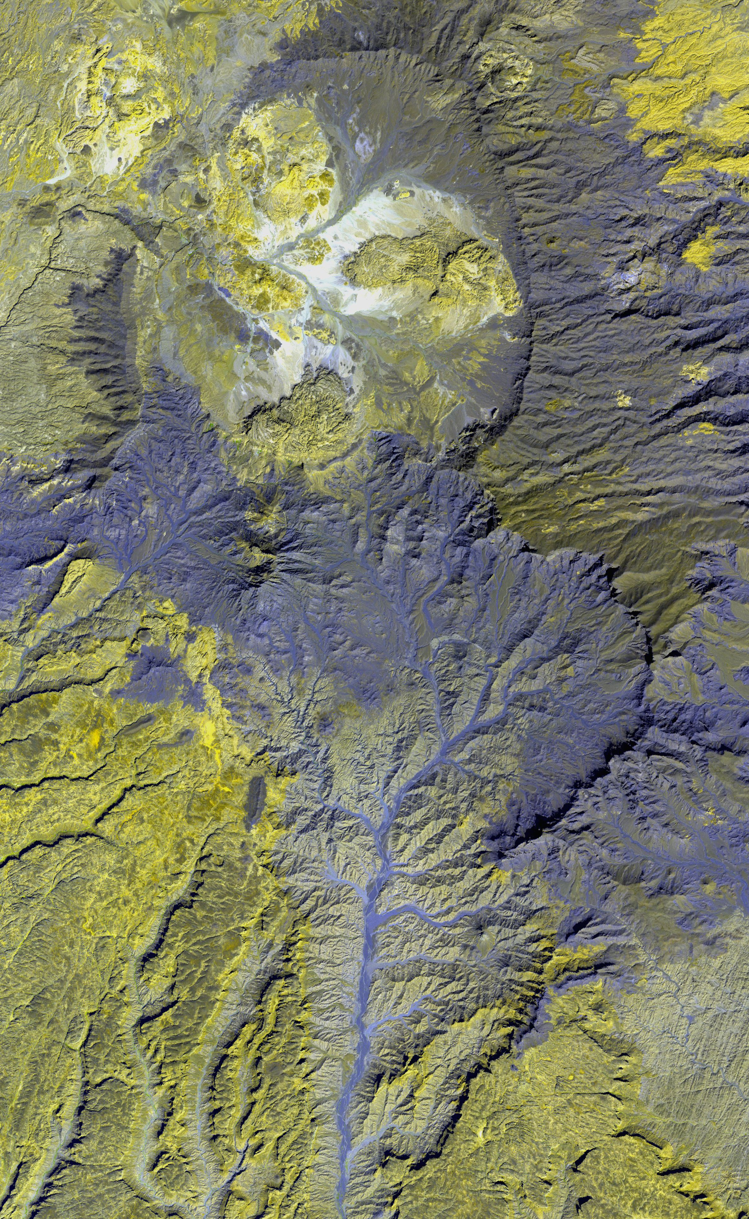 Le Tarso Yéga, vue satellite par TerraLook ASTER (date 2003-11-21)